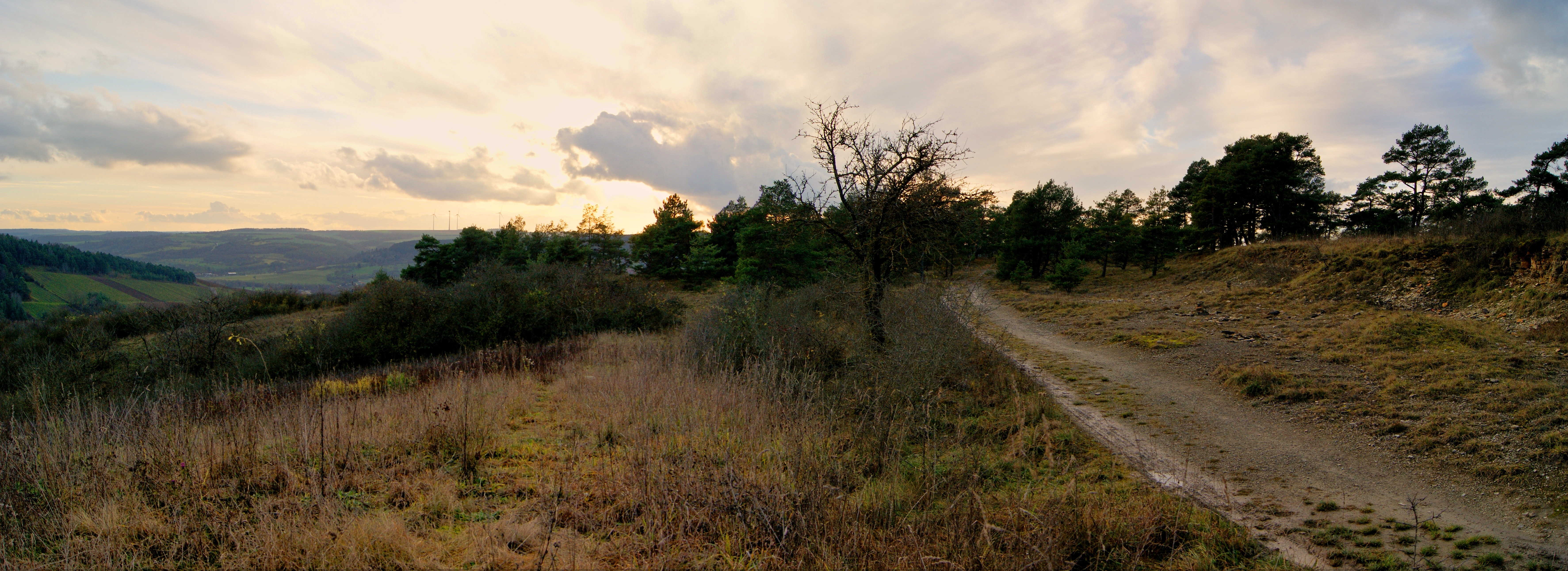 Naturschutzgebiet „Höhfeldplatte und Scharlachberg“ (NSG 00610.01) im Landkreis Würzburg, Bayern